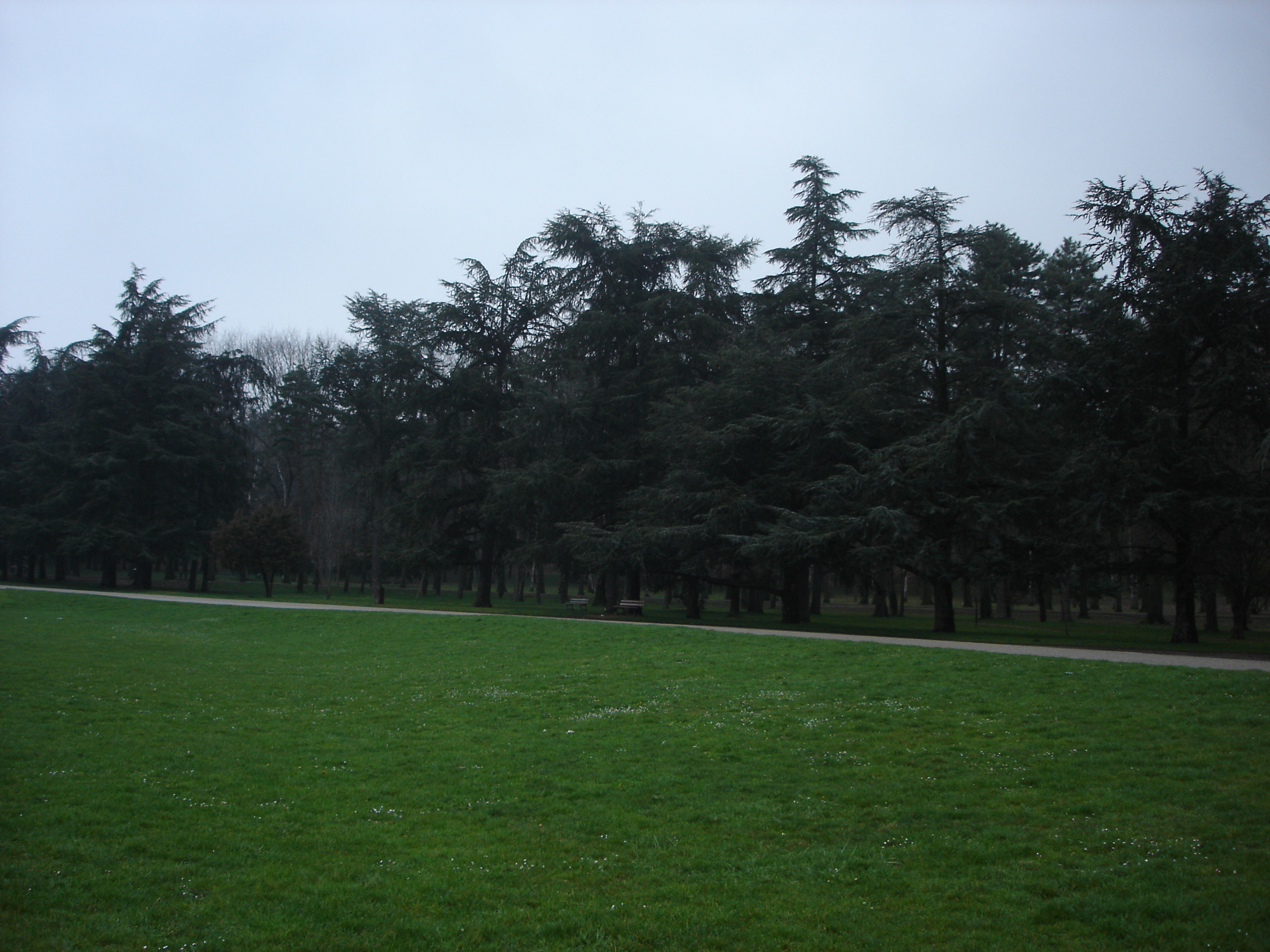 Forêt du parc de Parilly au niveau de la plaine de jeux.